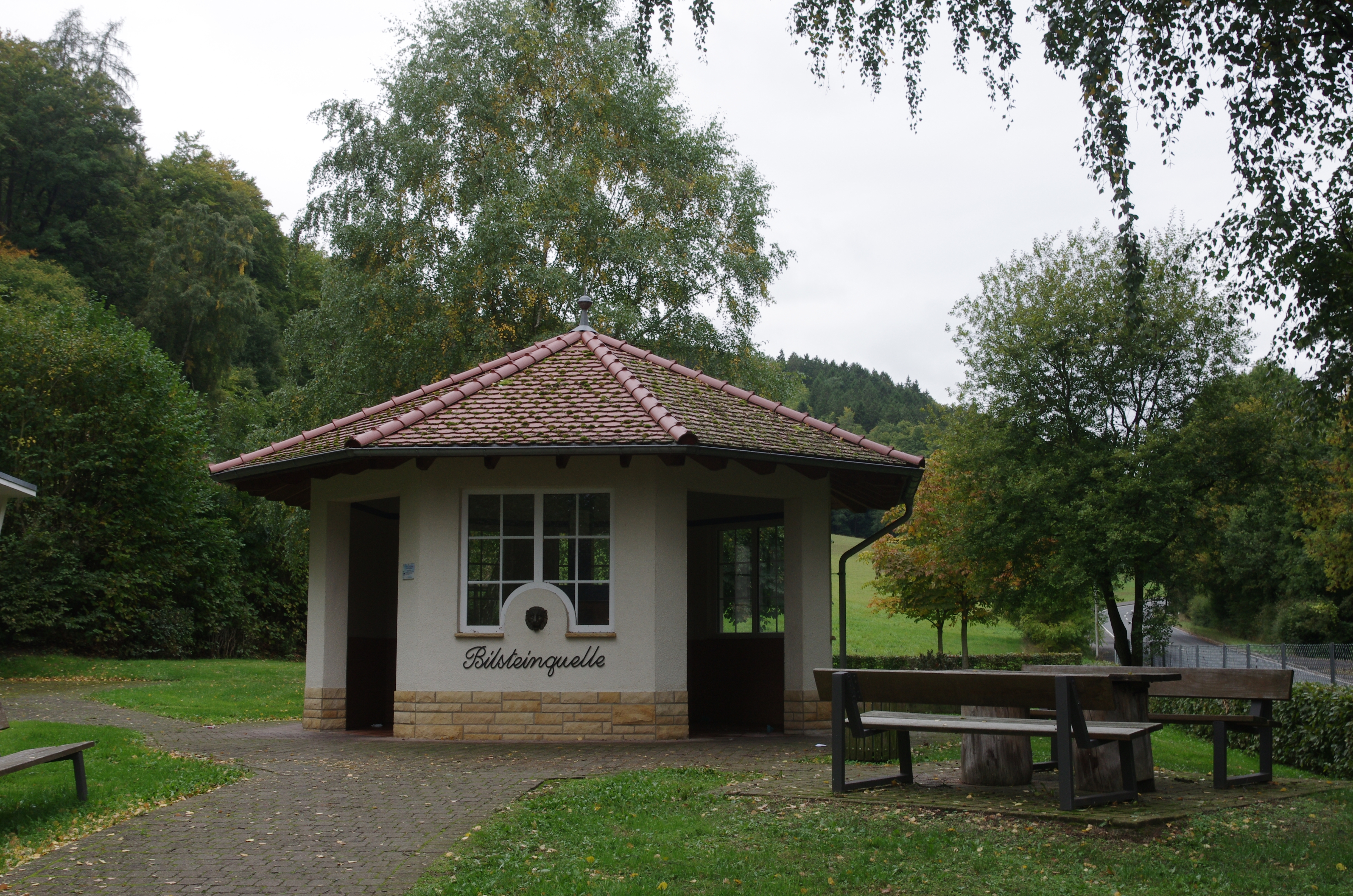 Bad Wildungen Ortsteil Reitzenhagen. Die Bilsteinquelle befinden sich unterhalb der Bilsteinklippen in Reitzenhagen.